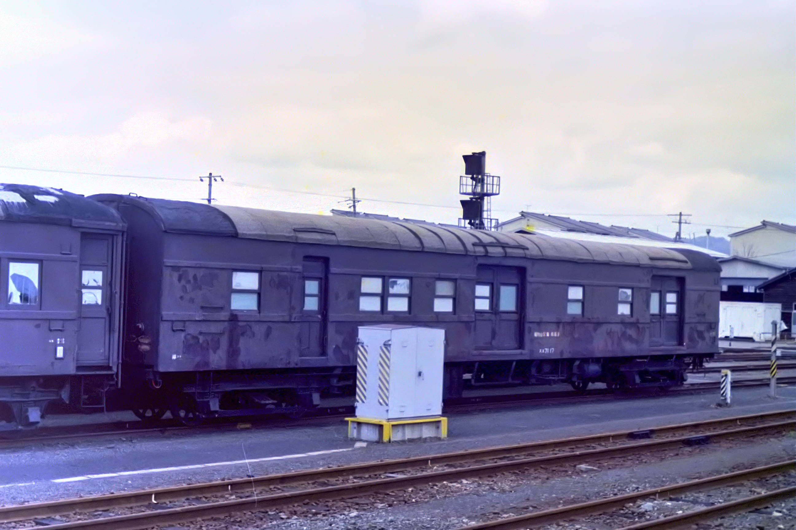 スエ７１ １７